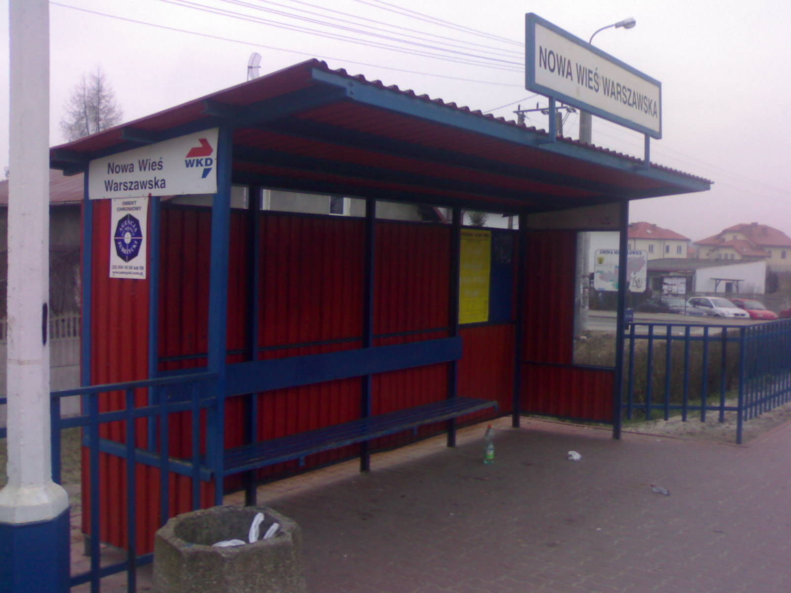 Nowa Wies Warszawska commuter train stop